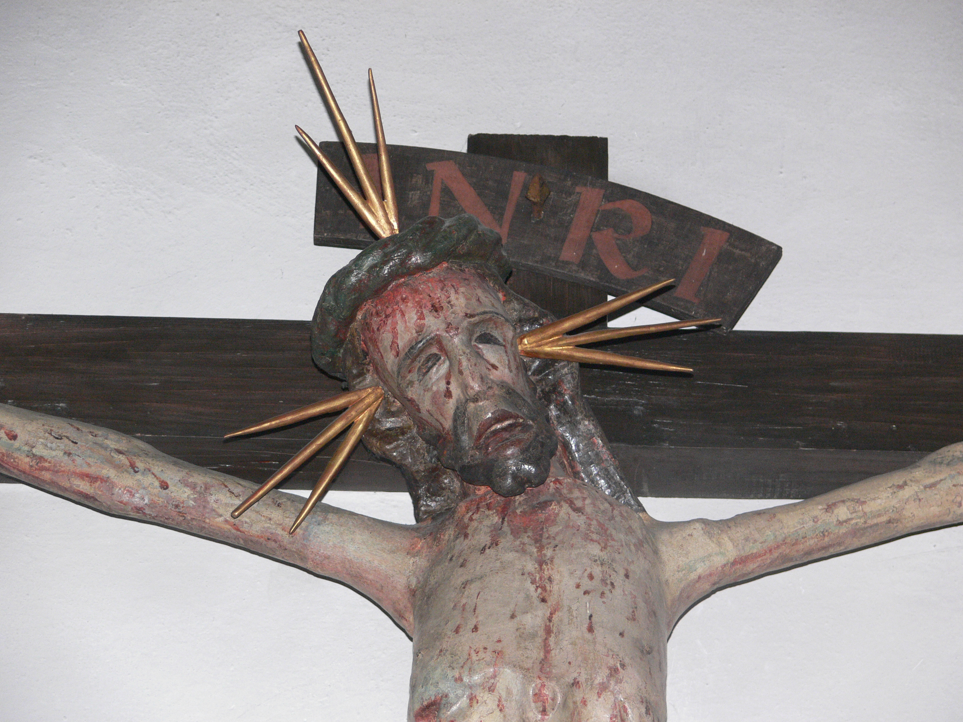 Pfarrkirche St. Johannes Baptist (ehem. Klosterkirche Unserer Lieben Frau), Baindt, Landkreis Ravensburg „Baindter Pestkreuz“, um 1350, Detail